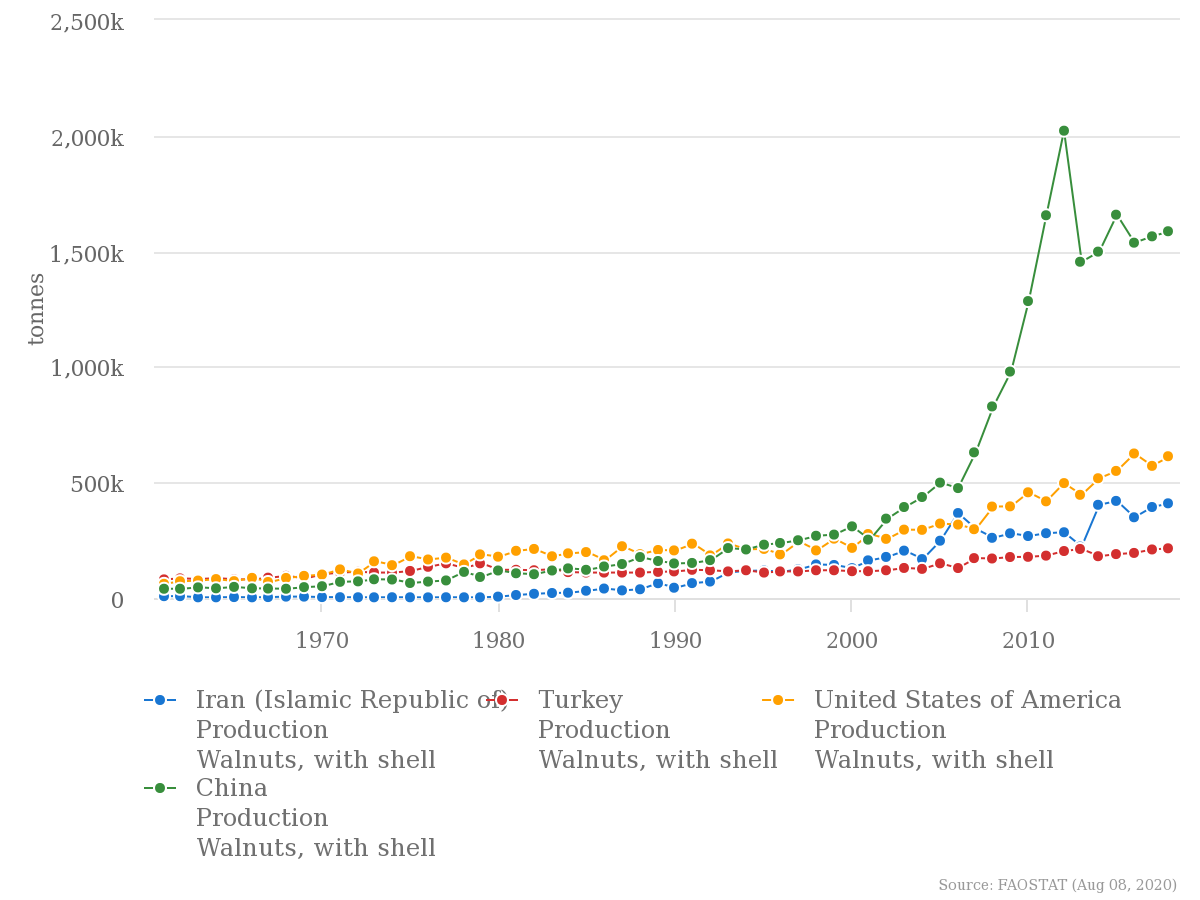 نمودار گردو